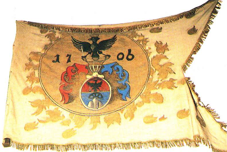 Drapeau Kuruc de 1706 orné des amres de Rákóczi.